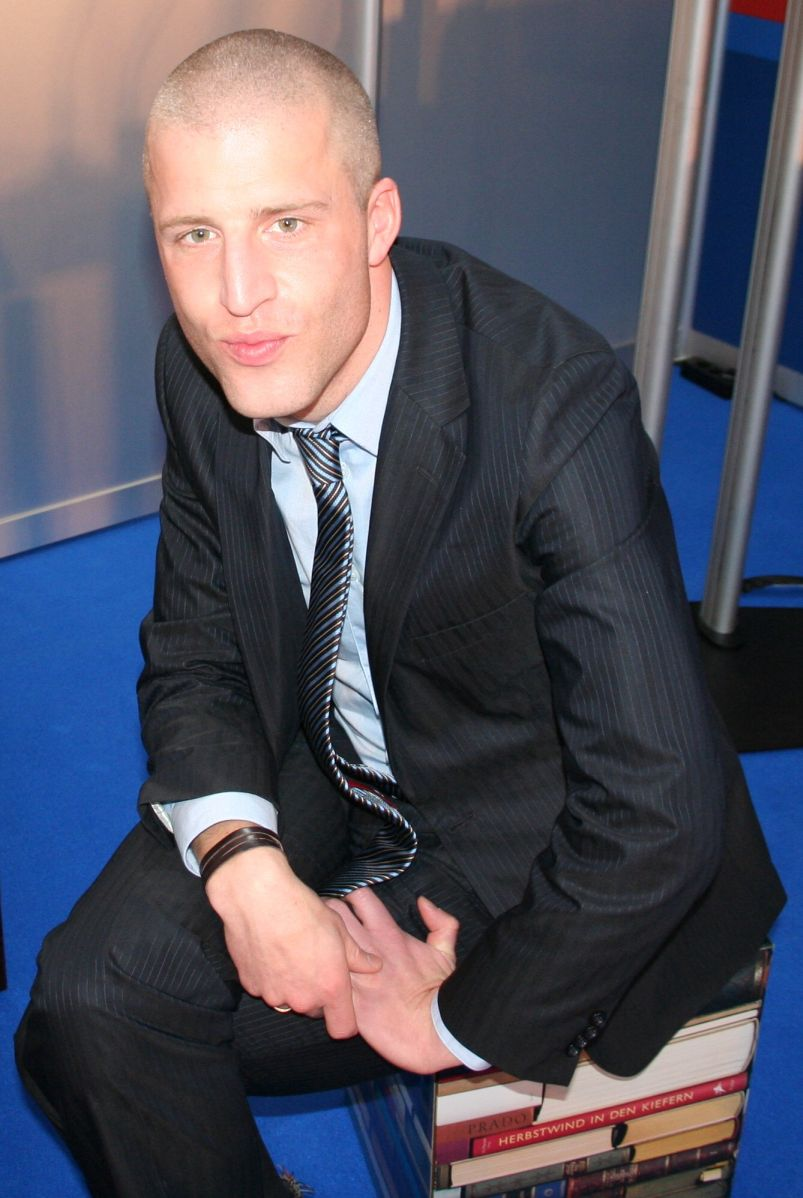 Benjamin von Stuckrad-Barre auf der Leipziger Buchmesse 2007